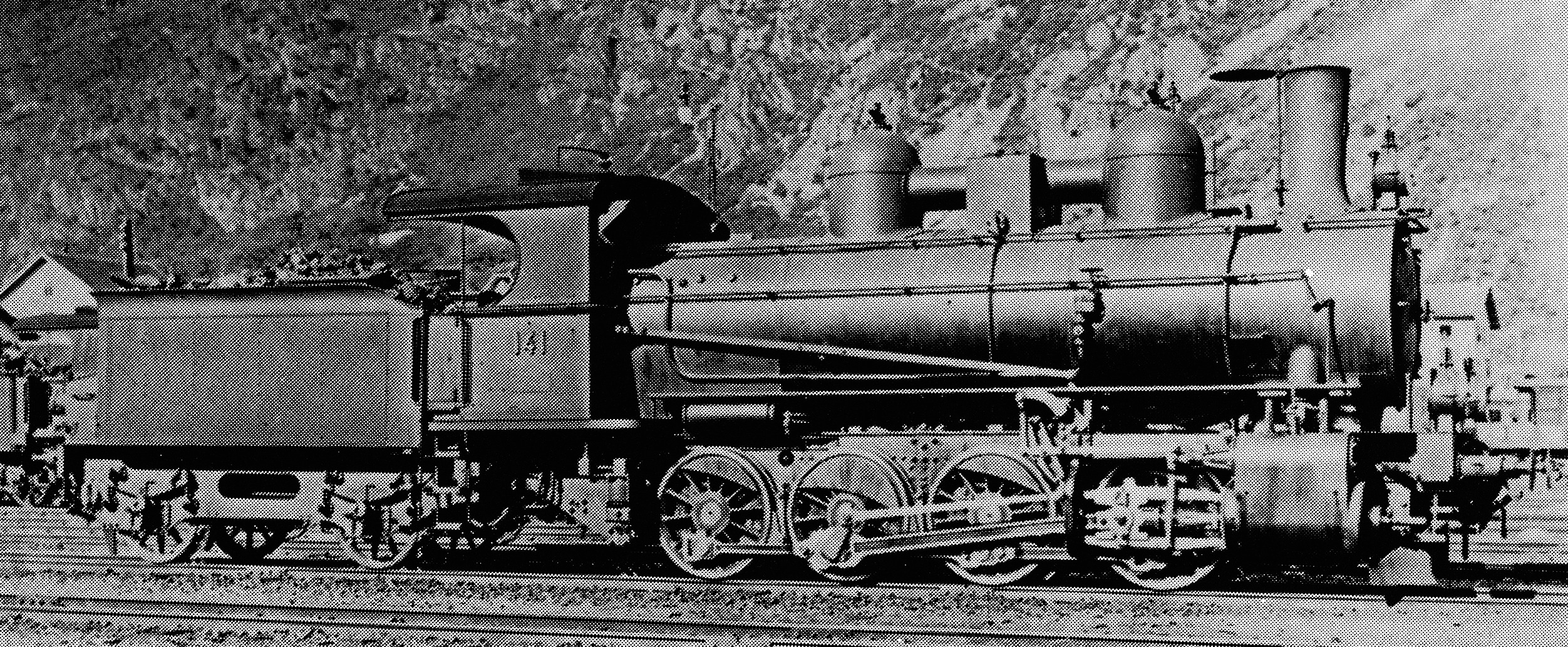 Güterzuglocomotive D 4/4 Nr. 141 der Gotthardbahn für den Bergdienſt, gebaut 1901 inn der Schweizeriſchen Locomotiv- und Machines-Fabrique zů Winterthur (Fabr.-Nr. 1391), 1909 als Nr. 4001 von den Schweizeriſchen Bundesbahnen übernommen, 1928 außer Dienſt geſtellt und anſchließend abgebrochen.